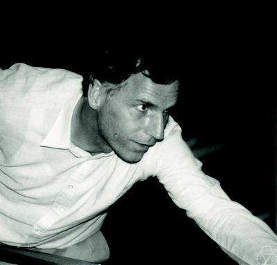 Foto di Ulrich Hirsch